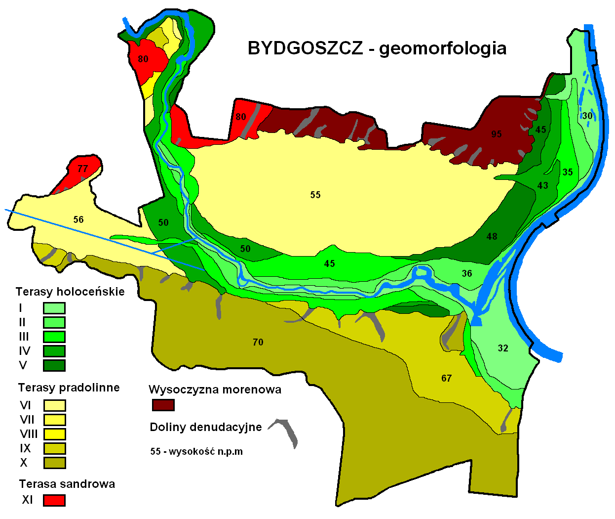 Geomorfologia Bydgoszczy - układ teras Pradoliny Noteci-Warty, doliny Brdy i Wisły na podstawie "Środowisko przyrodnicze Bydgoszczy, red. J. Banaszak, 1996"